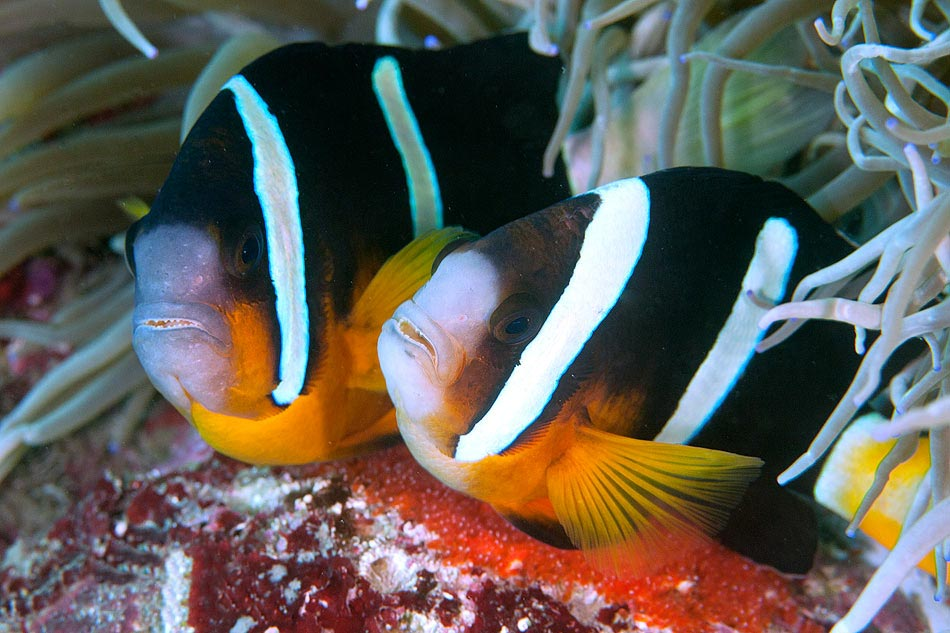 クマノミの産卵